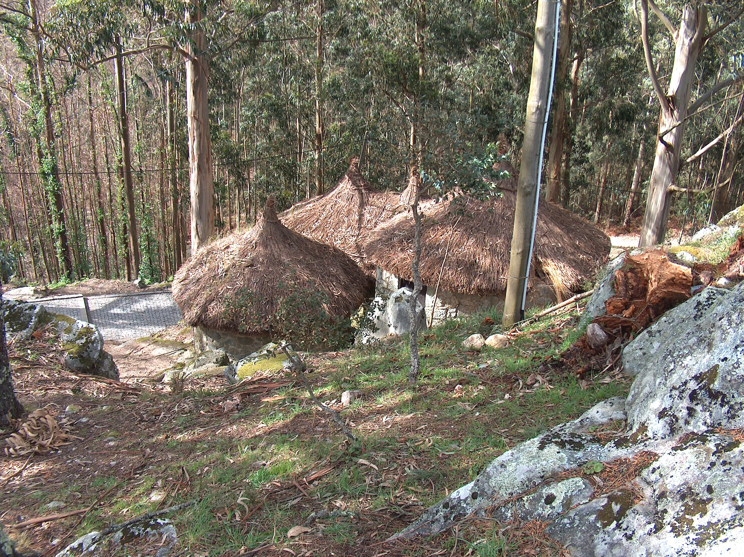 Castro de São Lourenço. Castro de São Lourenço, na freguesia de Vila Chã,concelho de Esposende, distrito de Braga, Portugal.